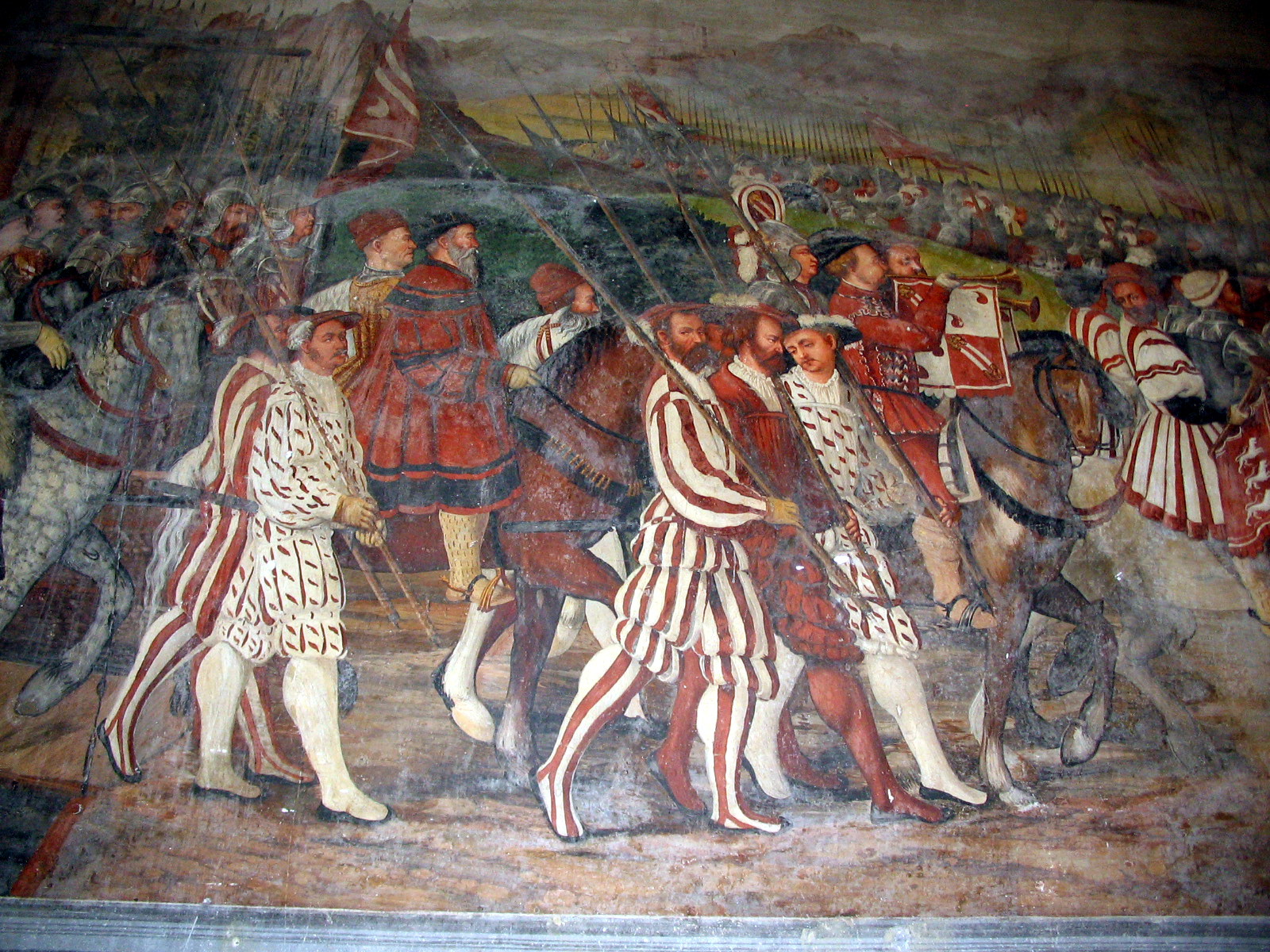 Affreschi del Castello di Malpaga, di Bartolomeo Colleoni. Cristiano I di Danimarca visita il Colleoni. Particolare: Immagine di Cristiano I e del Colleoni. Opera attribuita al Romanino (1467). Foto di Giorces.